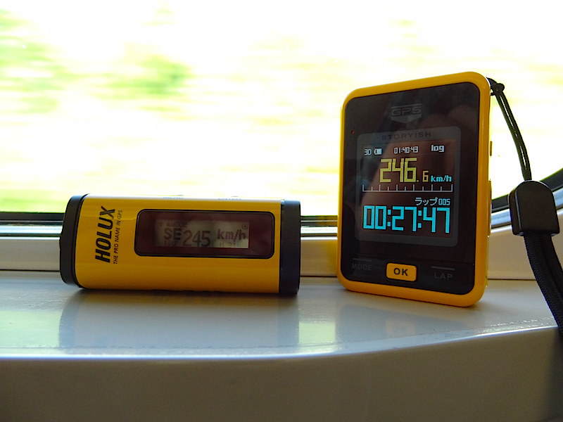 GPSロガー （300系こだまグリーン車）